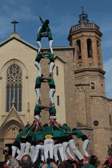 Segon 2 de 8 amb folre carregat, fet pels Castellers de Sabadell en la XVIII Diada dels Saballuts.